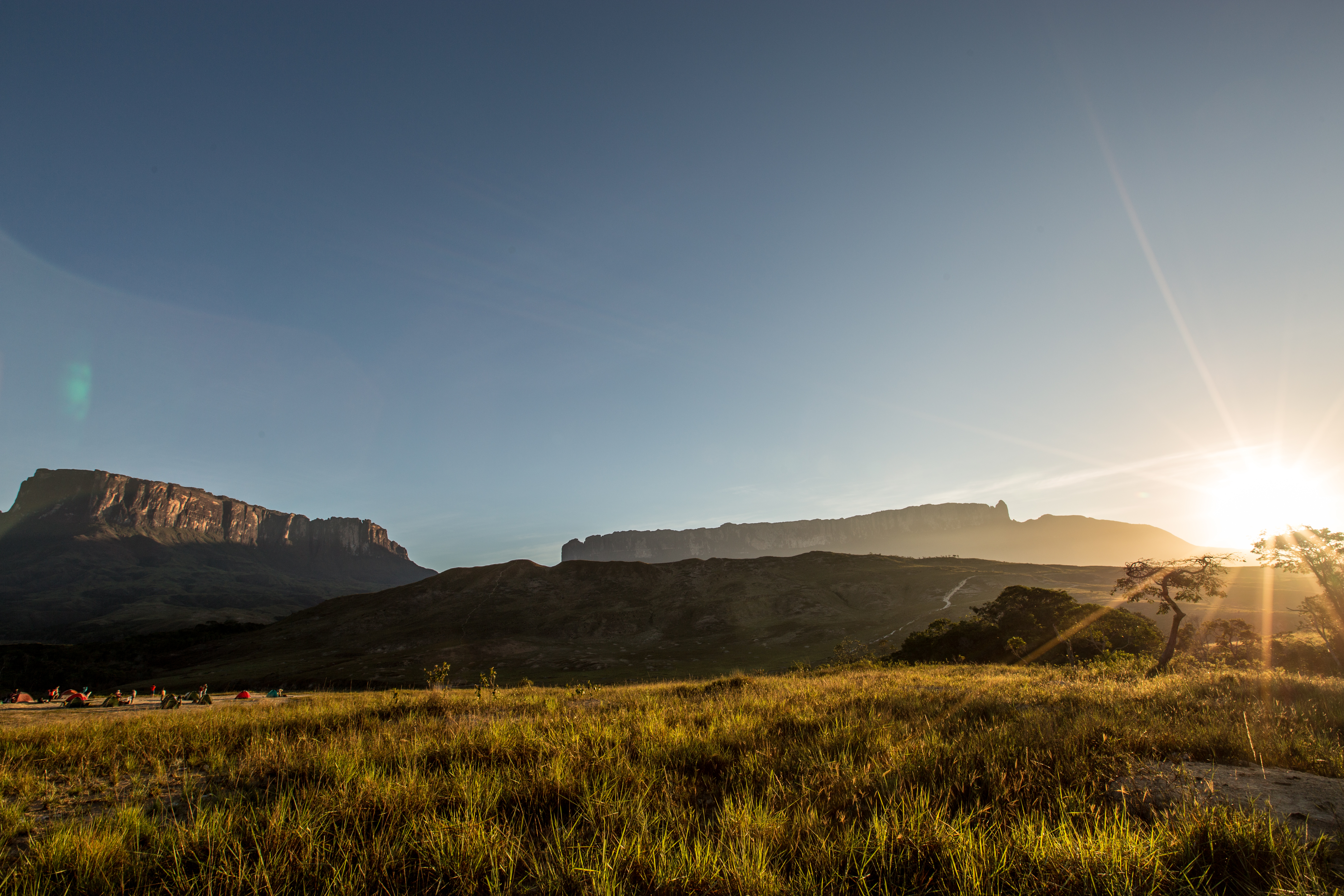 Monte Roraima e Kukenan Tepui ao amanhecer, com sol radiante.